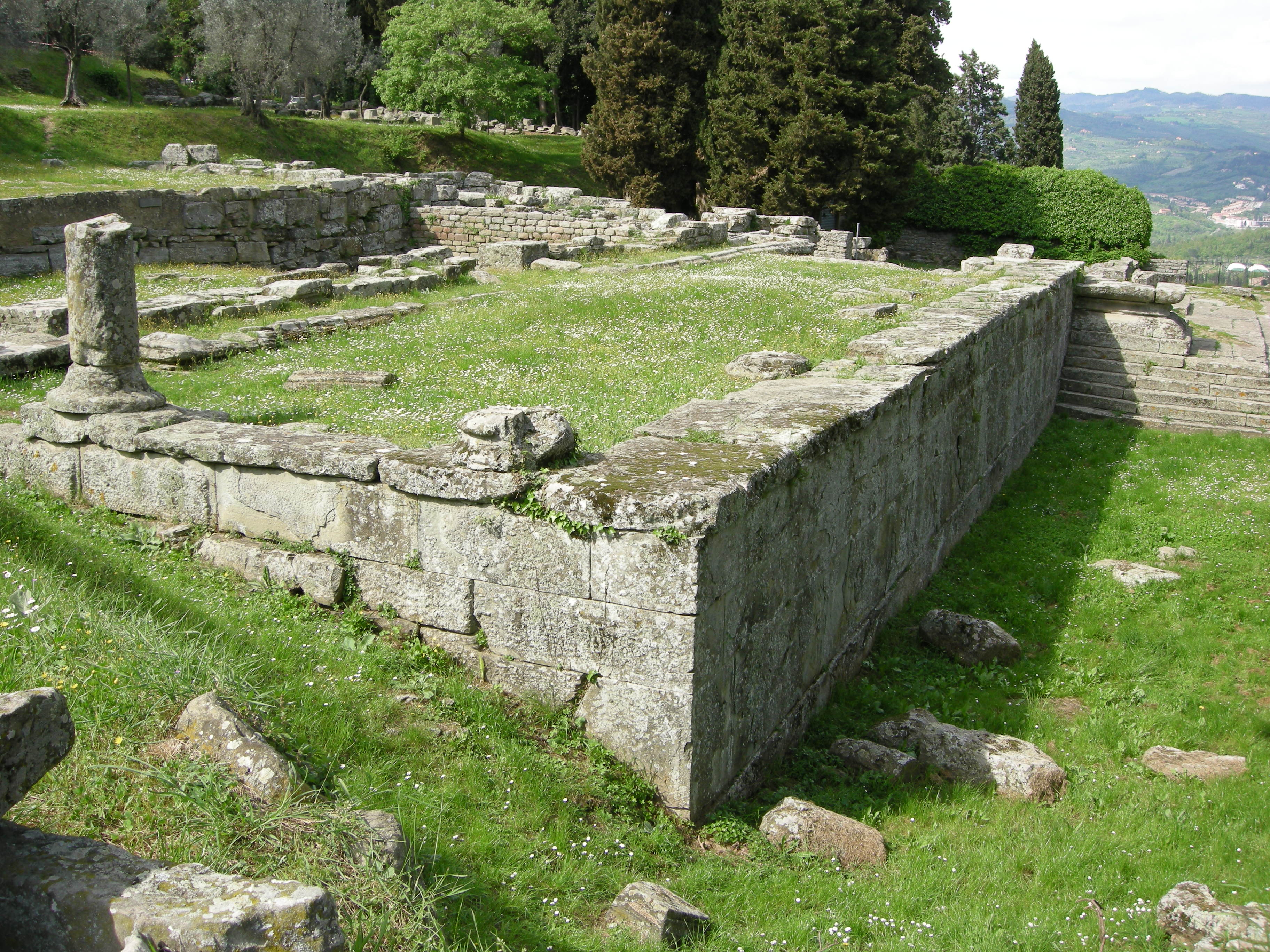 Fiesole, area archeologica, templi